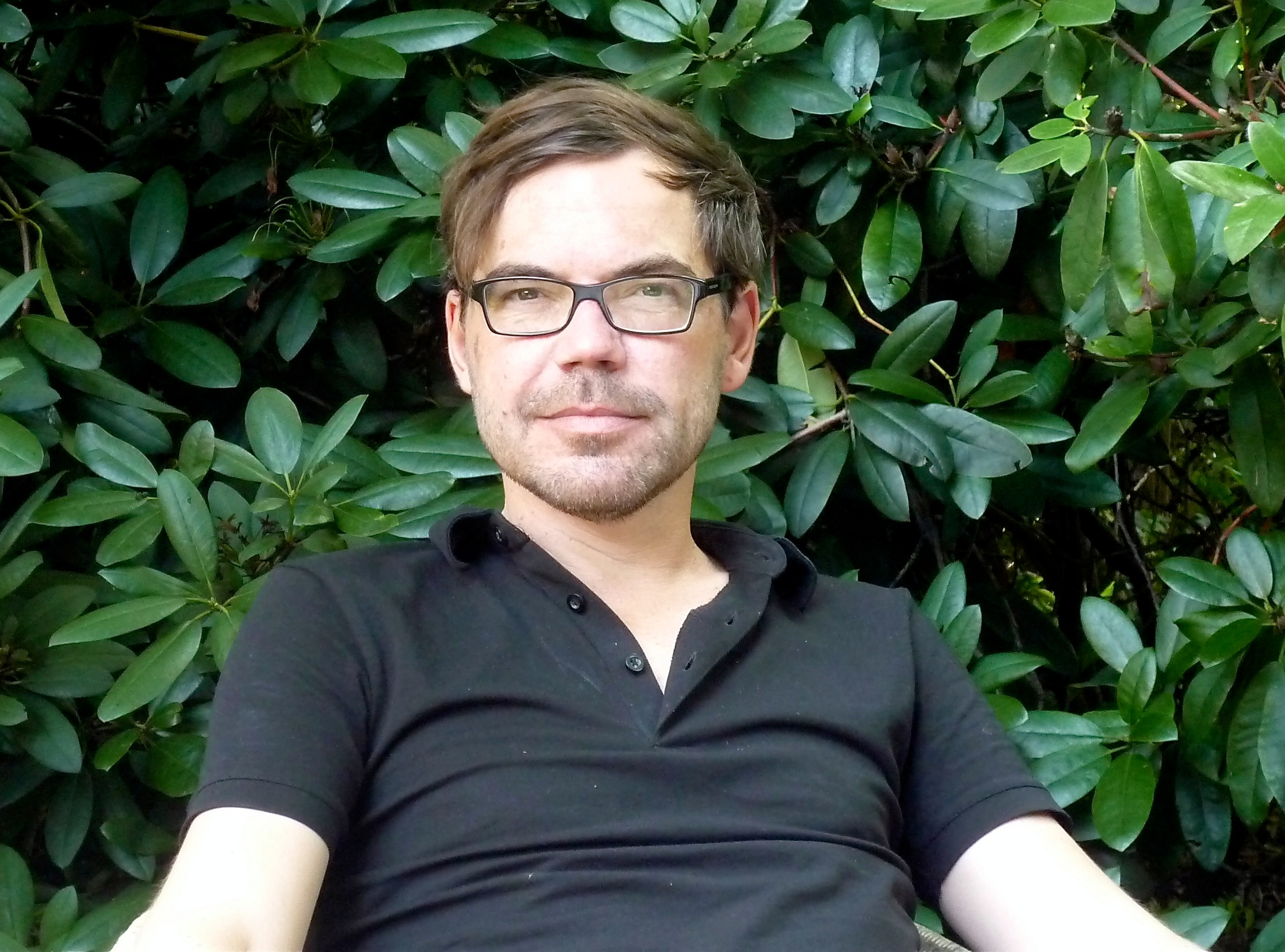 der Schriftsteller David Wagner, von Kadi Fast fotografiert, die das Bild freigegeben hat